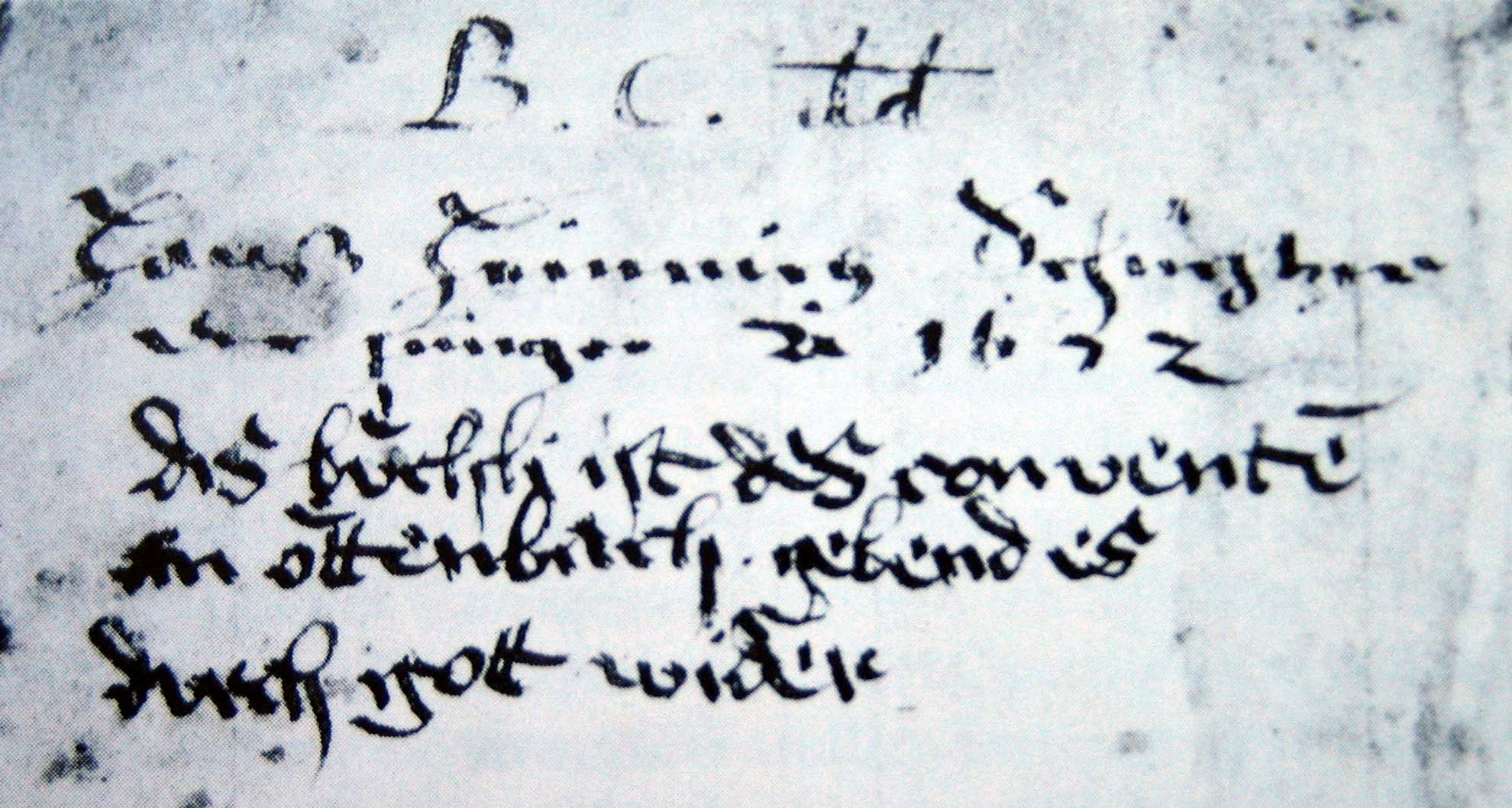 Verbal-ExLibris aus dem «Büchlein der heiligen Weisheit» von Heinrich Seuse aus dem 14. Jhd. Dis buechli ist des conventen an Oetenbach. Gebend es durch gott wider. Darüber der Vermerk der Stadtbibliothek: B(ibliothecae) C(ivicae) d(ono) d(edit) Hans Heinrich Schüchtzer der junger, Anno 1672